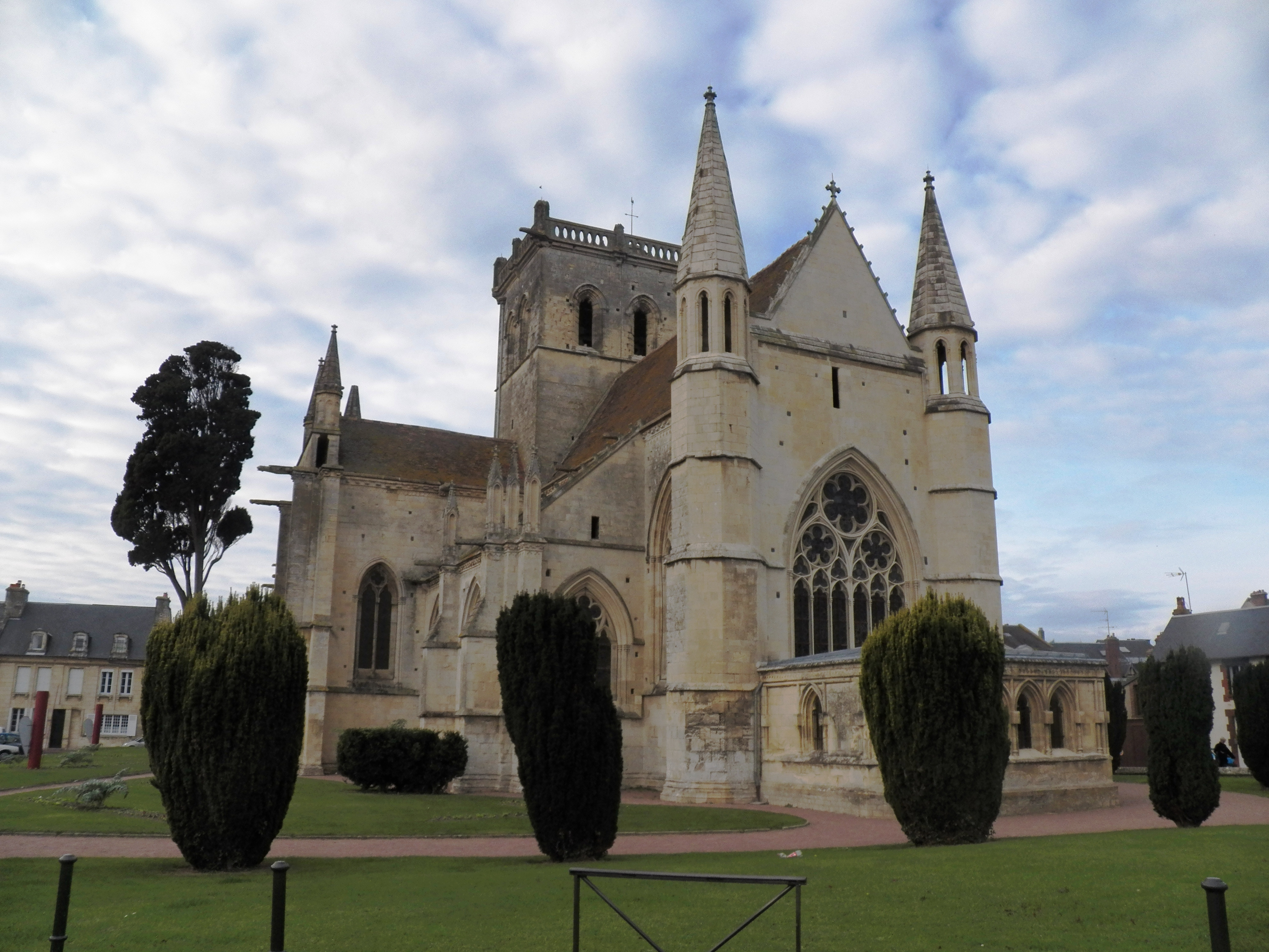 l'église Notre - Dame de Dives-sur-Mer , classée monument historique.